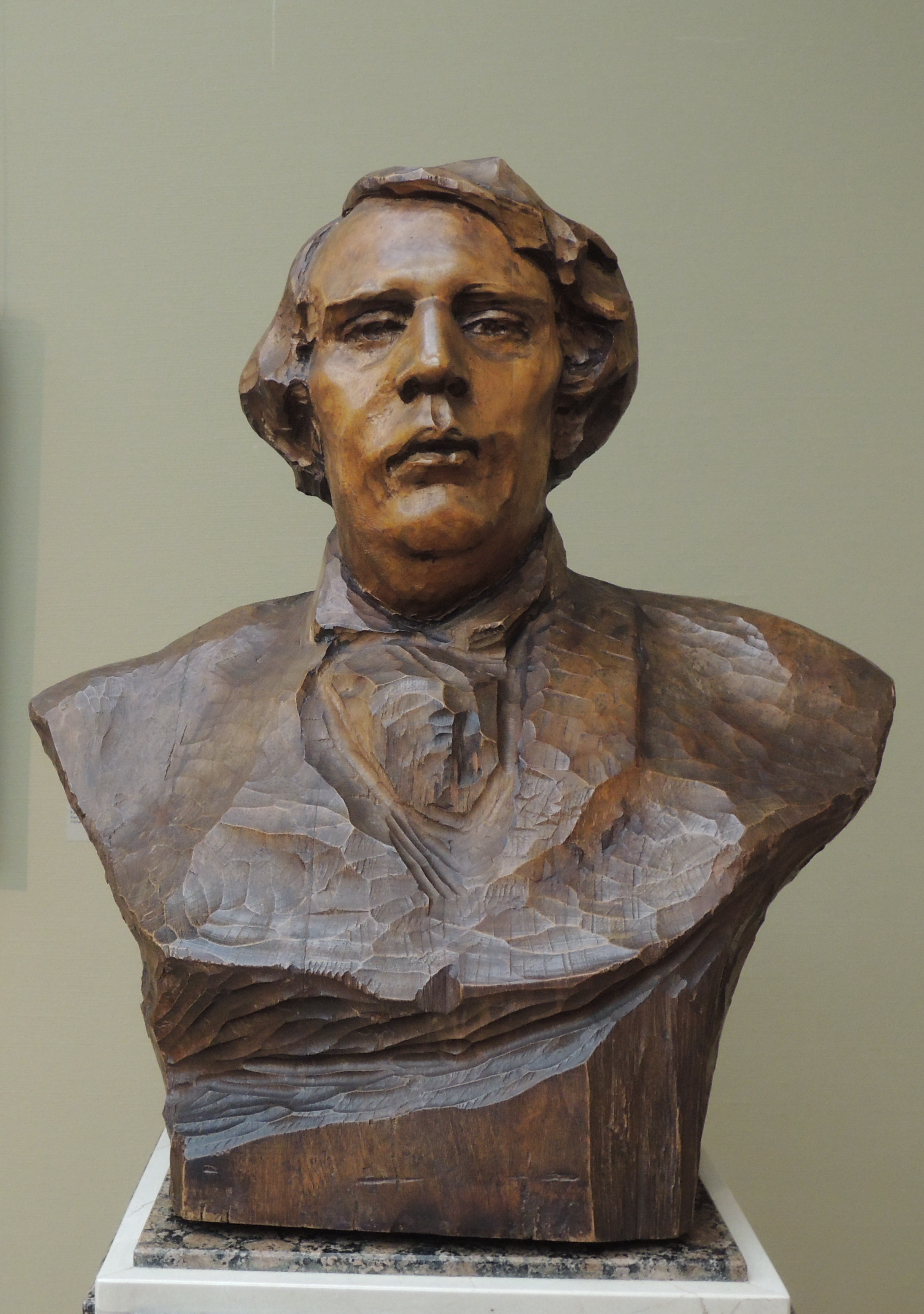 "Портрет А.Н. Толстого". Скульптор Анна Голубкина. Тонированное дерево. 1911. ГТГ.